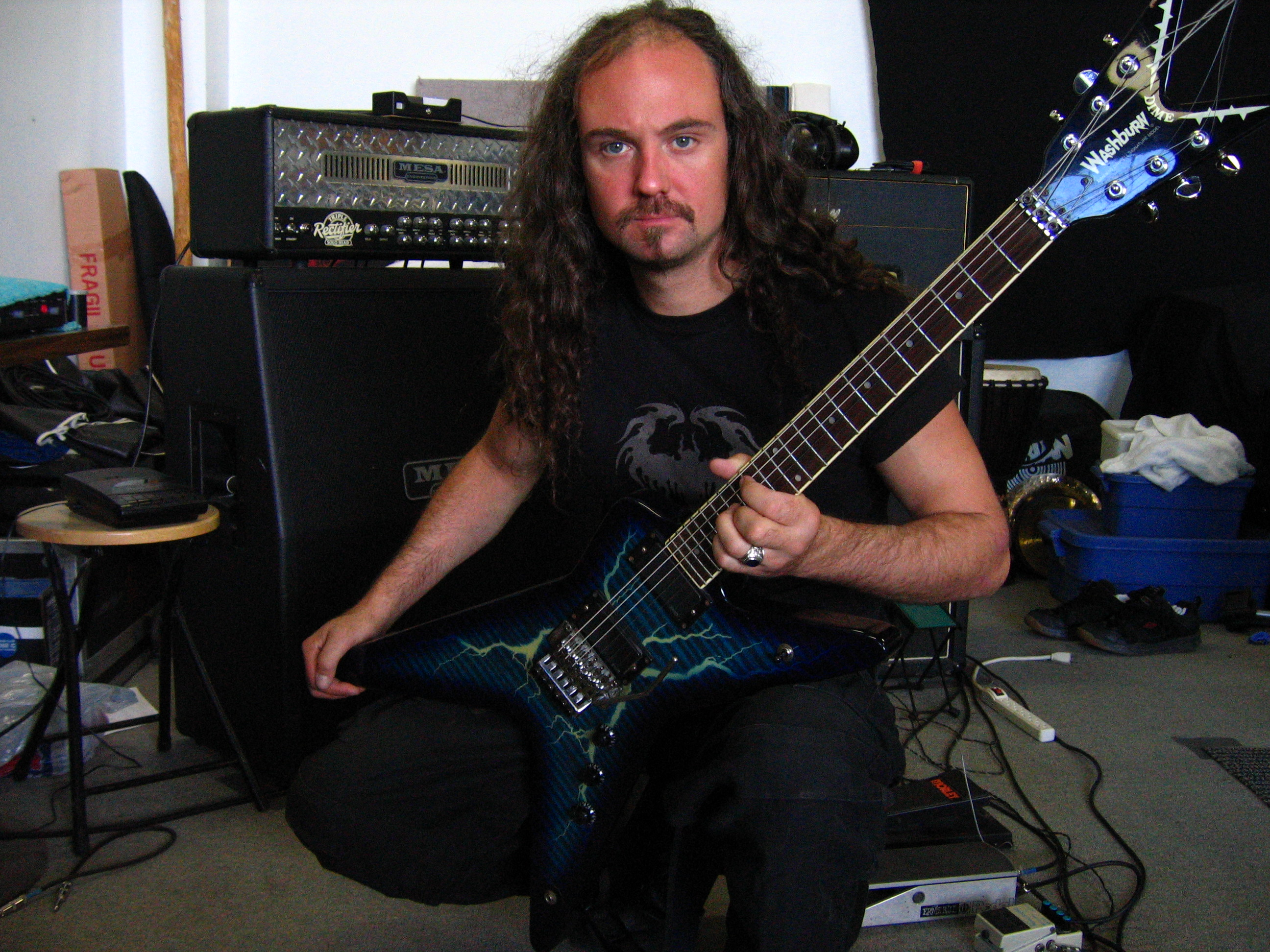 Beschreibung: Alex Auburn der Band Cryptopsy Von Alex Auburn erhalten und für Gemeinfrei erklärt.